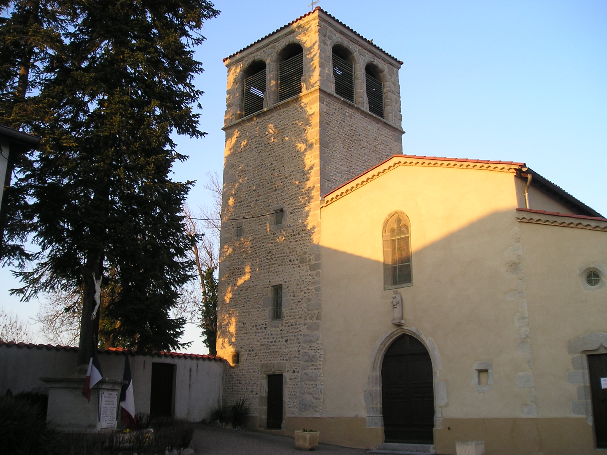 Eglise de Marclopt, Loire, France